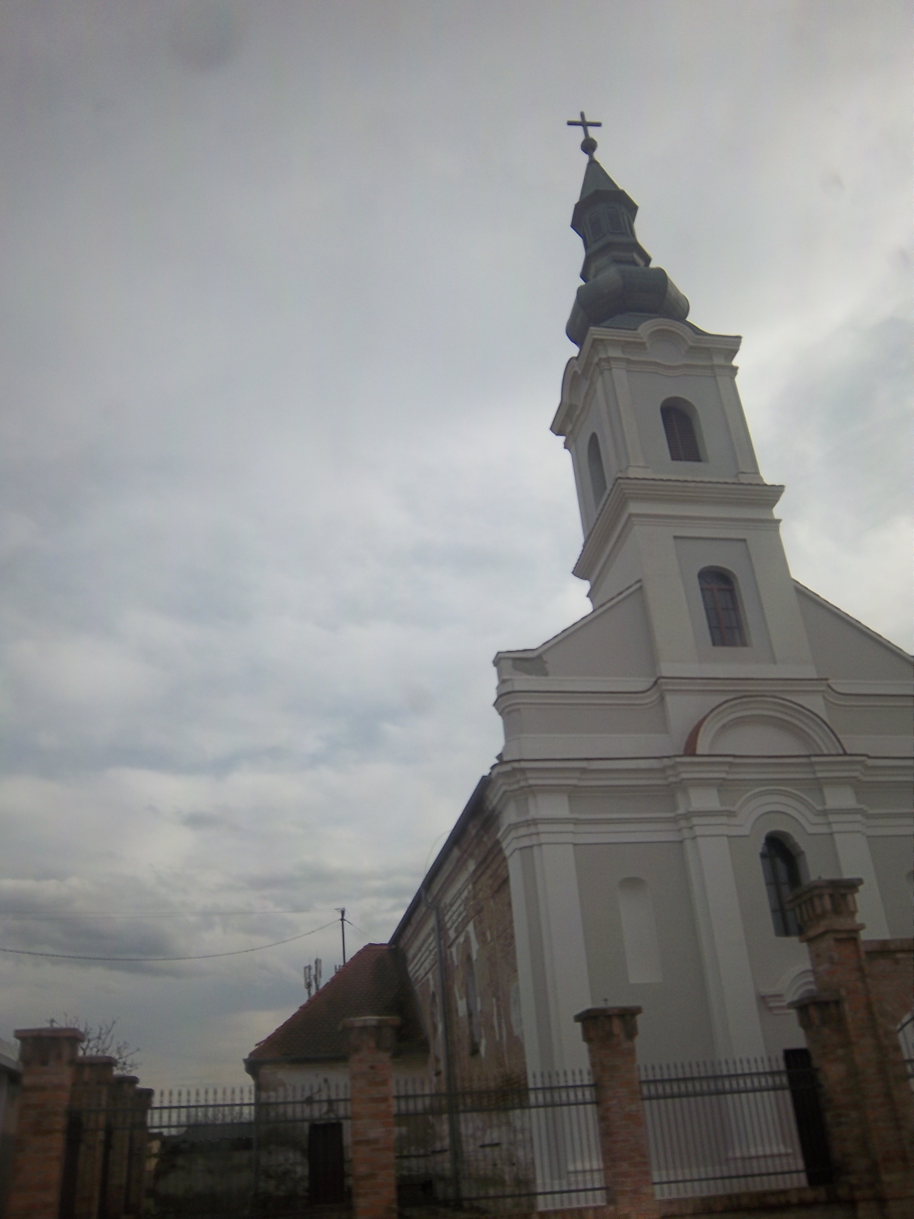 Srpskohrvatski / српскохрватски: Rimokatolička crkva u naselju Privlaka u Vukovarsko-srijemskoj županiji.